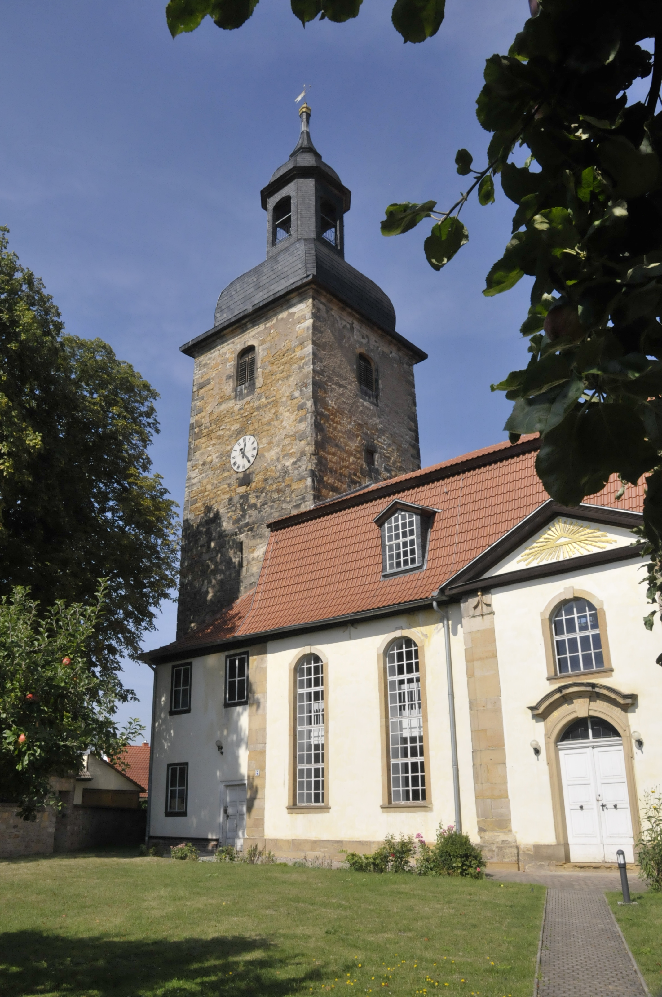 Friemar, Kirche St. Viti